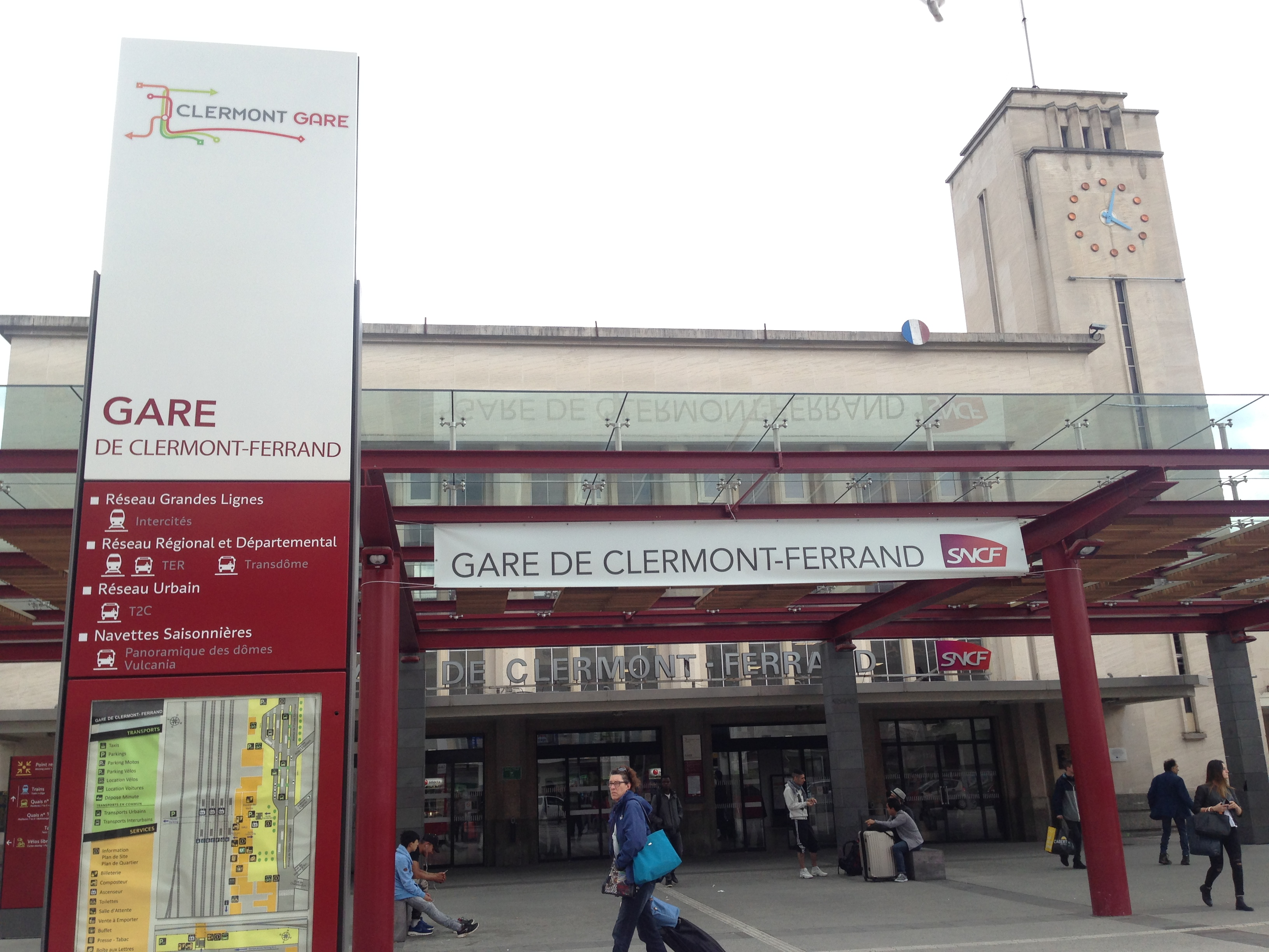 Gare de Clermont-Ferrand en 2017